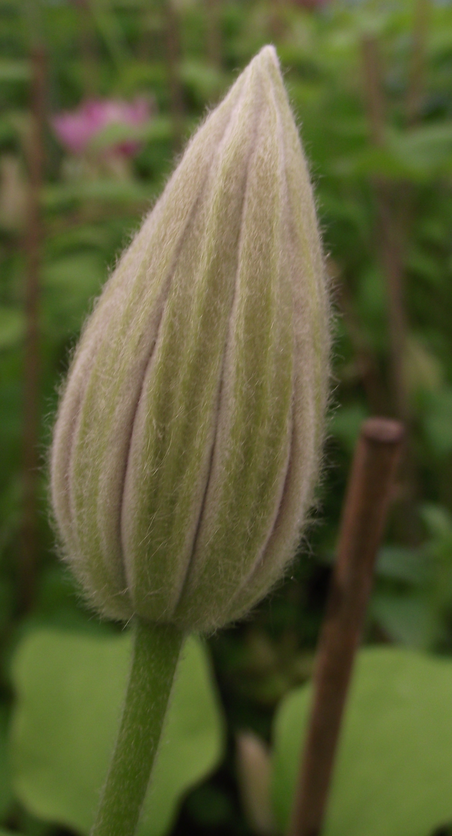 Bouton florale de 'Docteur Ruppel'